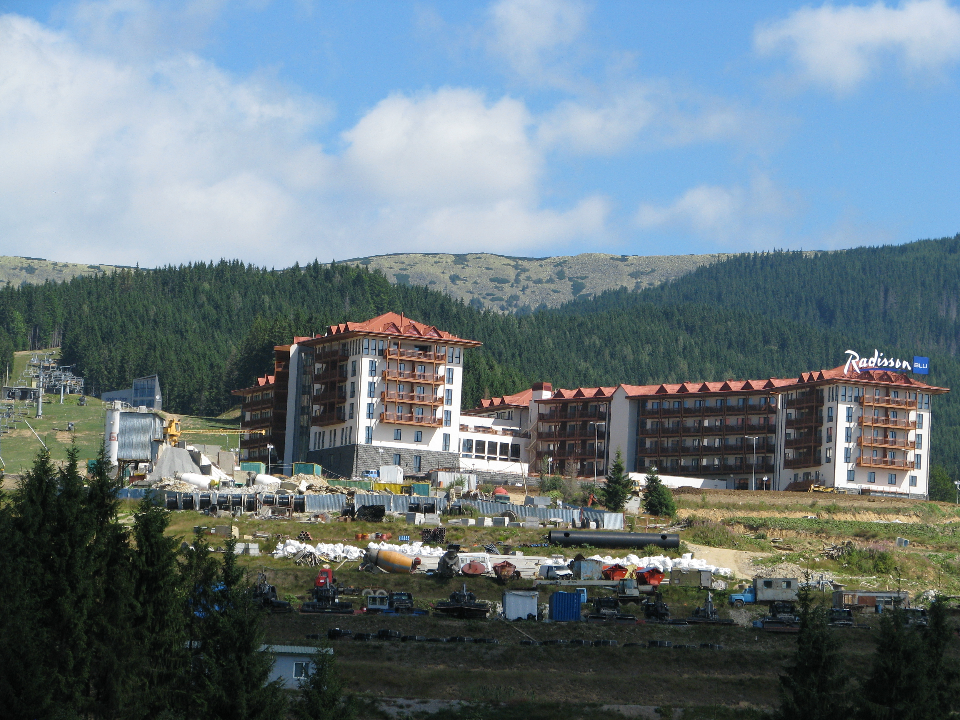 Ukrainian ski- and spa-resort "Bukovel" 2012 (4)